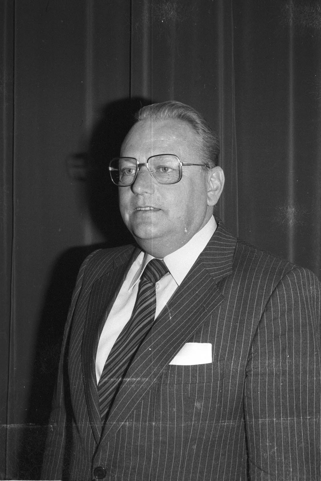 Präsident des Arbeitgeberverbandes Gesamtmetall.